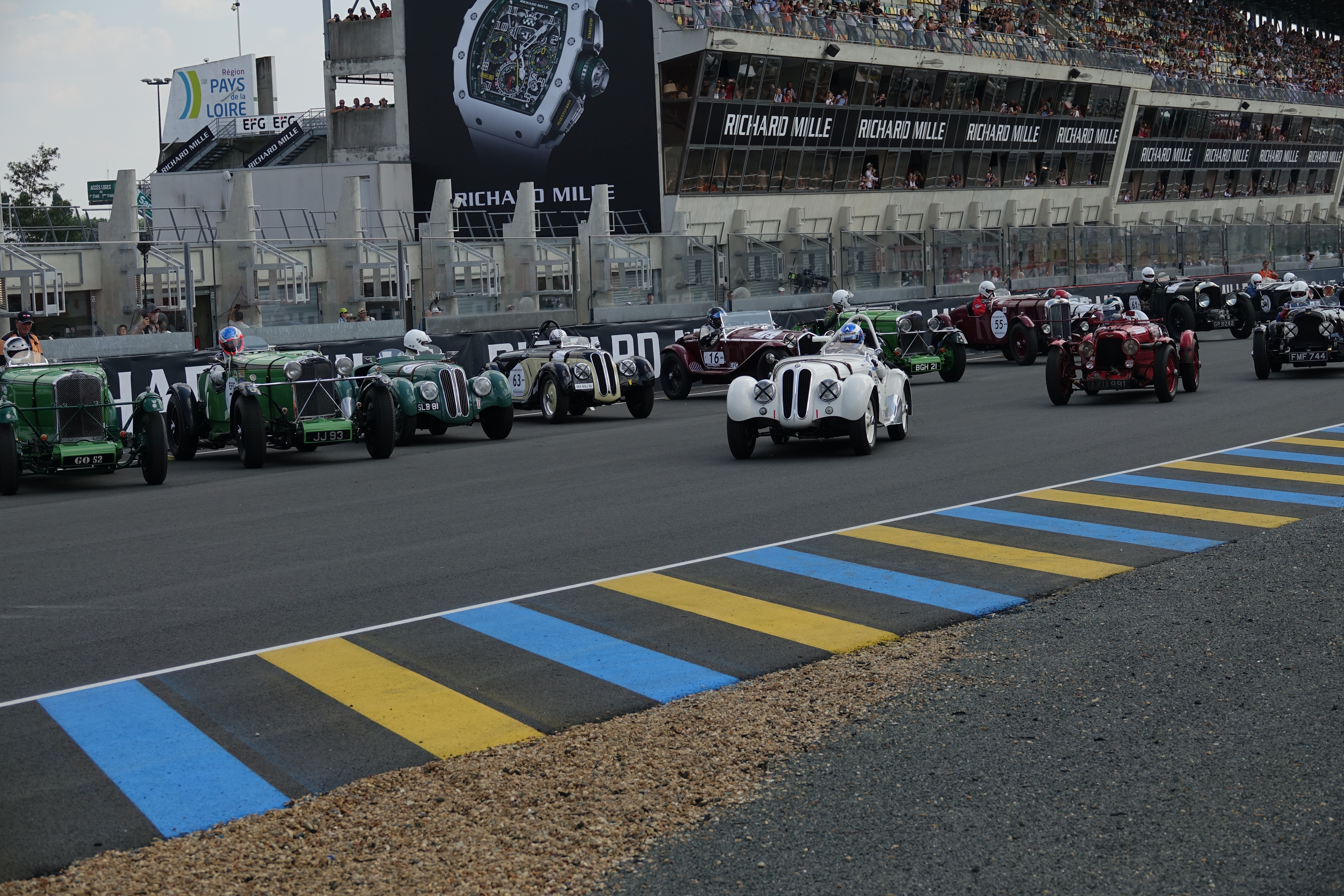 Le Mans Classic 2018